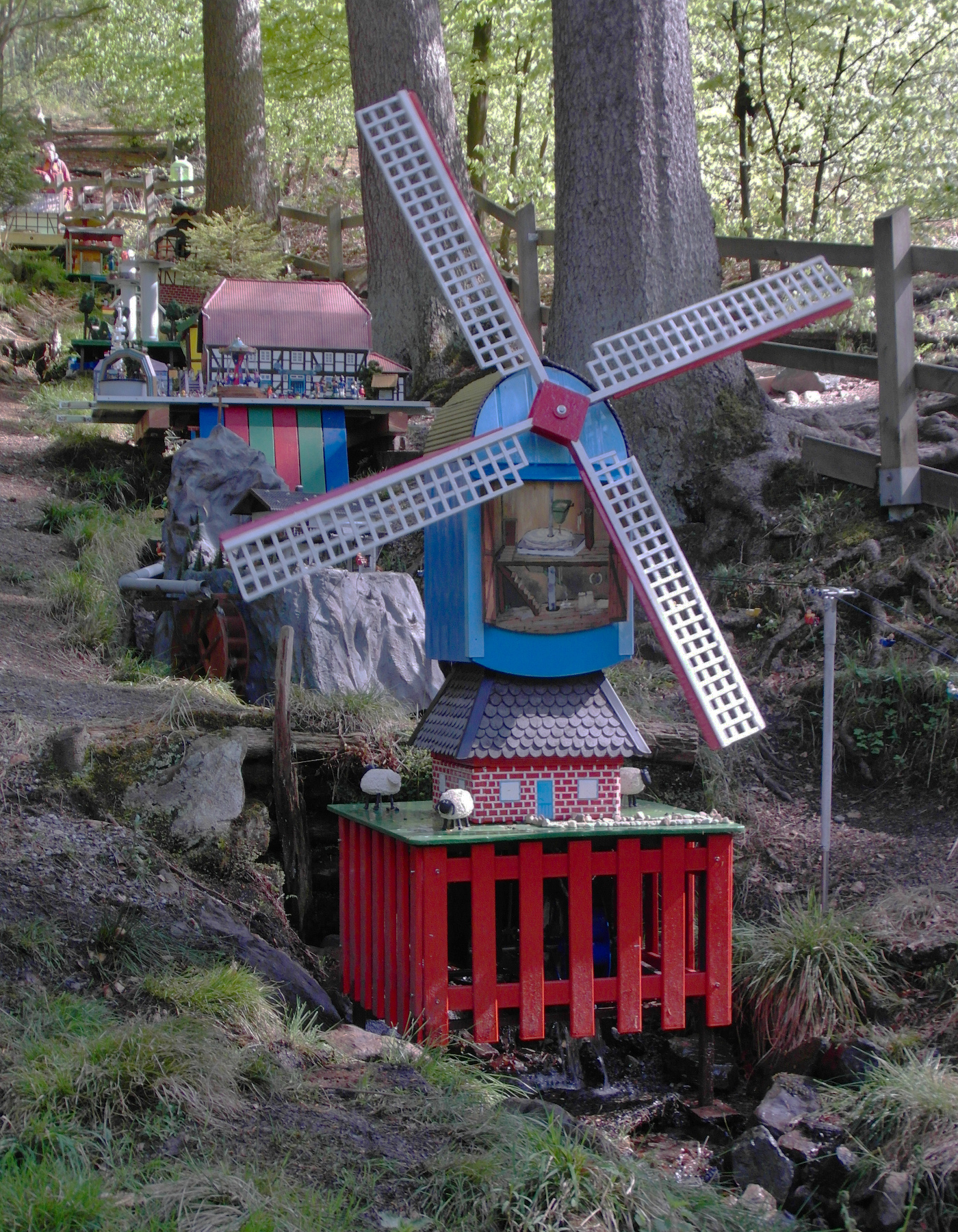 Die Modelle der Wennigser Wasserräder werden jährlich in oft überarbeitetem Design aufgebaut.